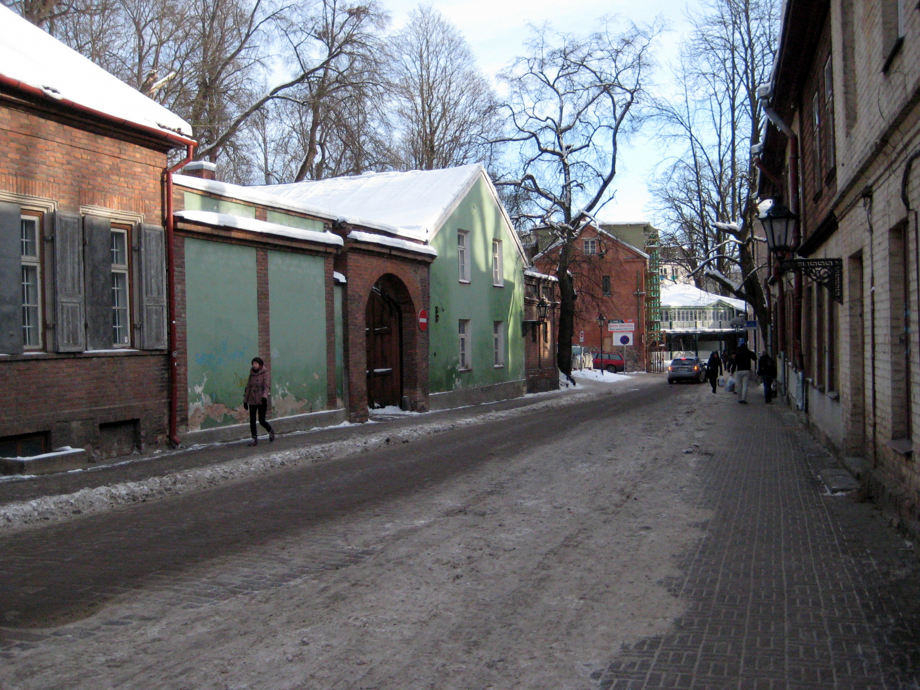 Vallikraavi tänav, vaatega Senffi treppide juurest